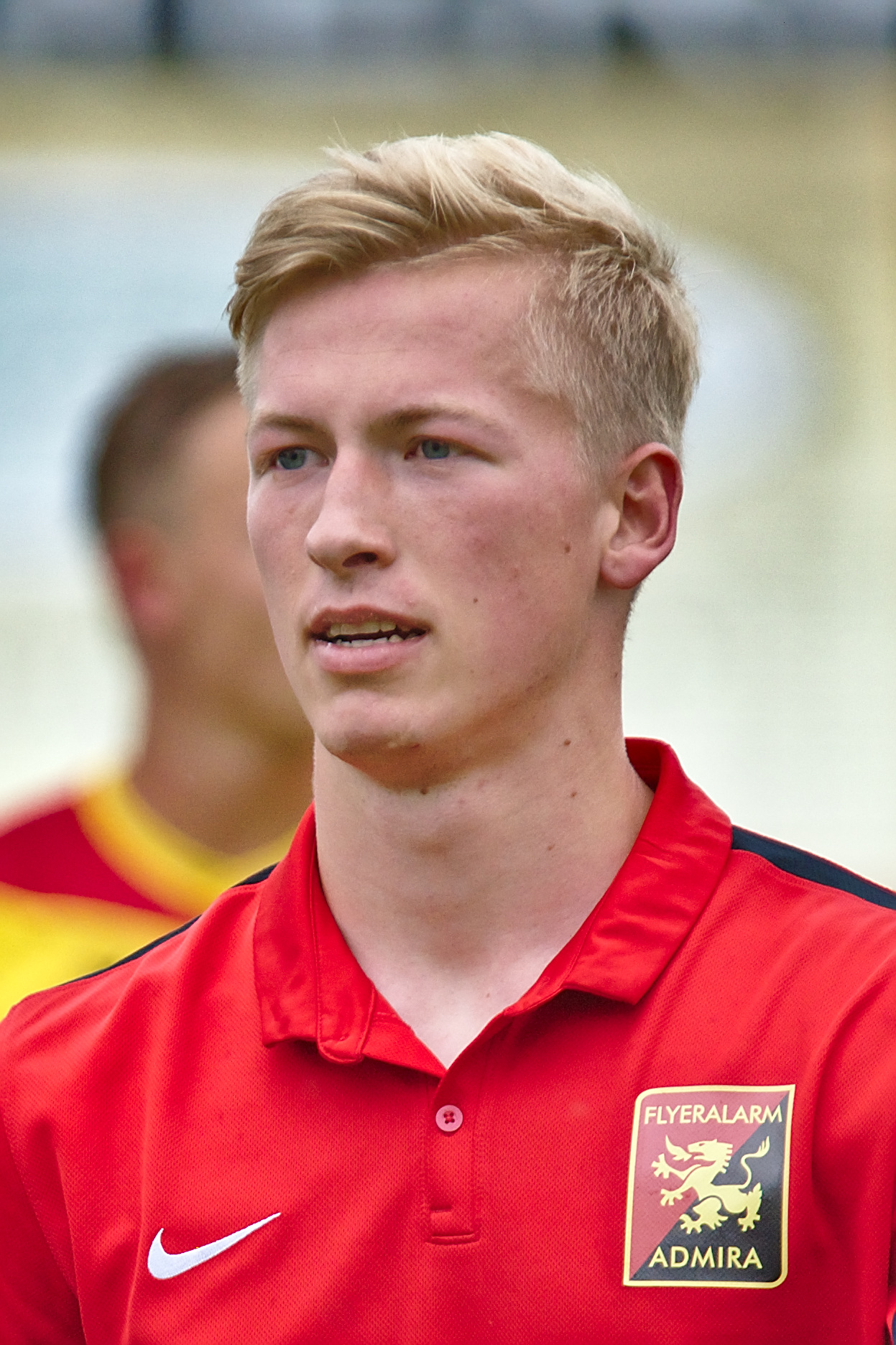 Saisonvorbereitungsspiel Admira Wacker Mödling gegen Kapfenberger SV am 17.6.2017, Bild zeigt: Markus Pavic